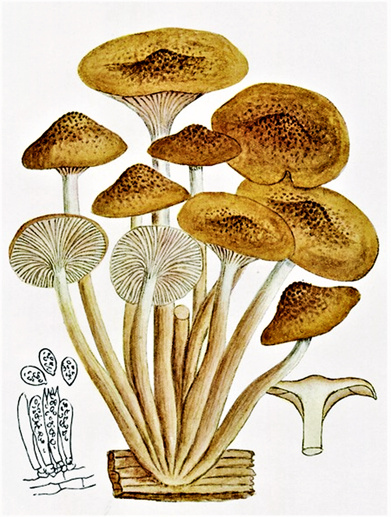 Giacomo Bresadola: Clytocybe tabescens (Scop., 1772) Bres. (1900), heute Armillaria tabescens (Scop.) Emel (1921)